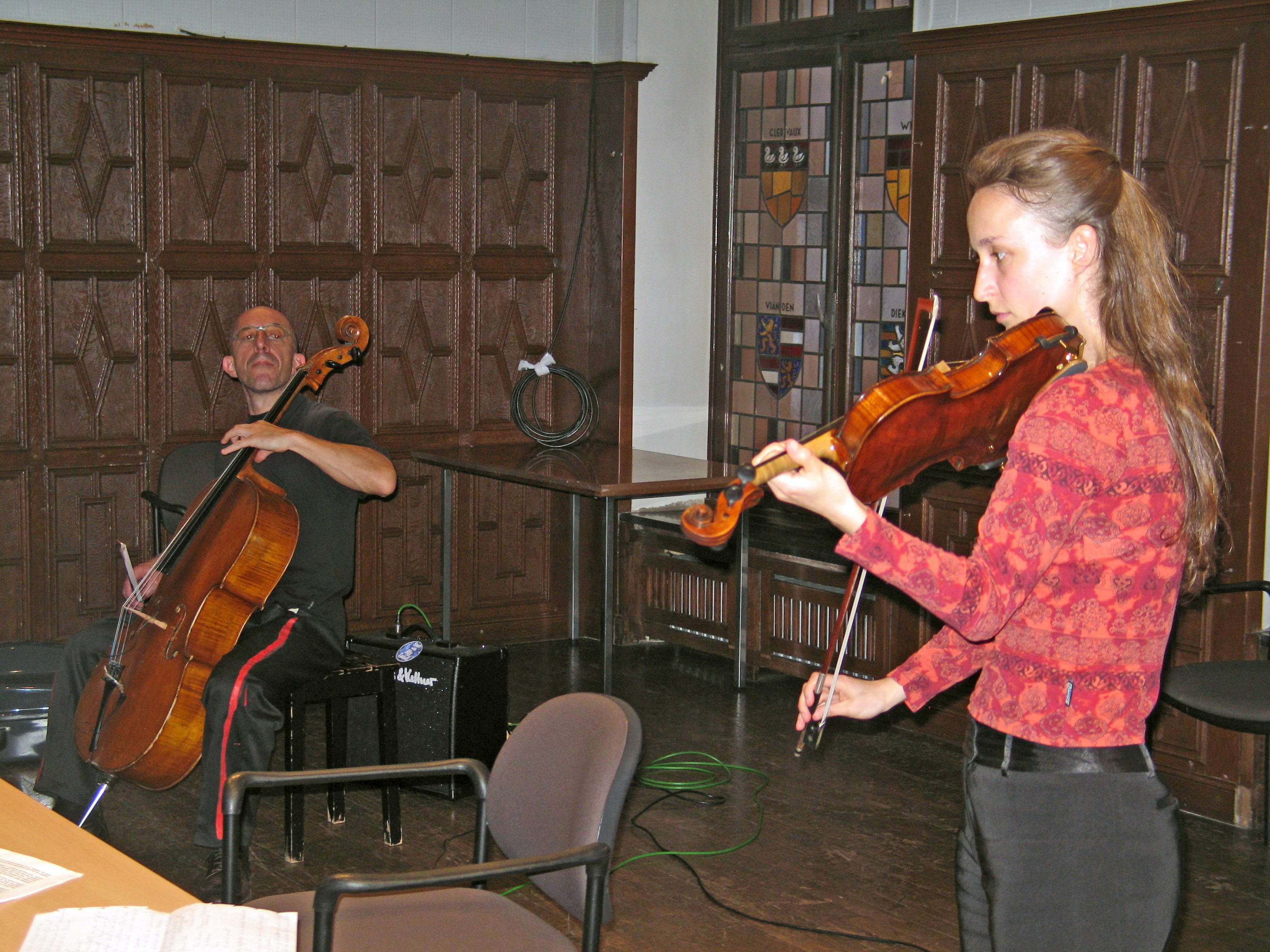 D'Johanna Weirich.